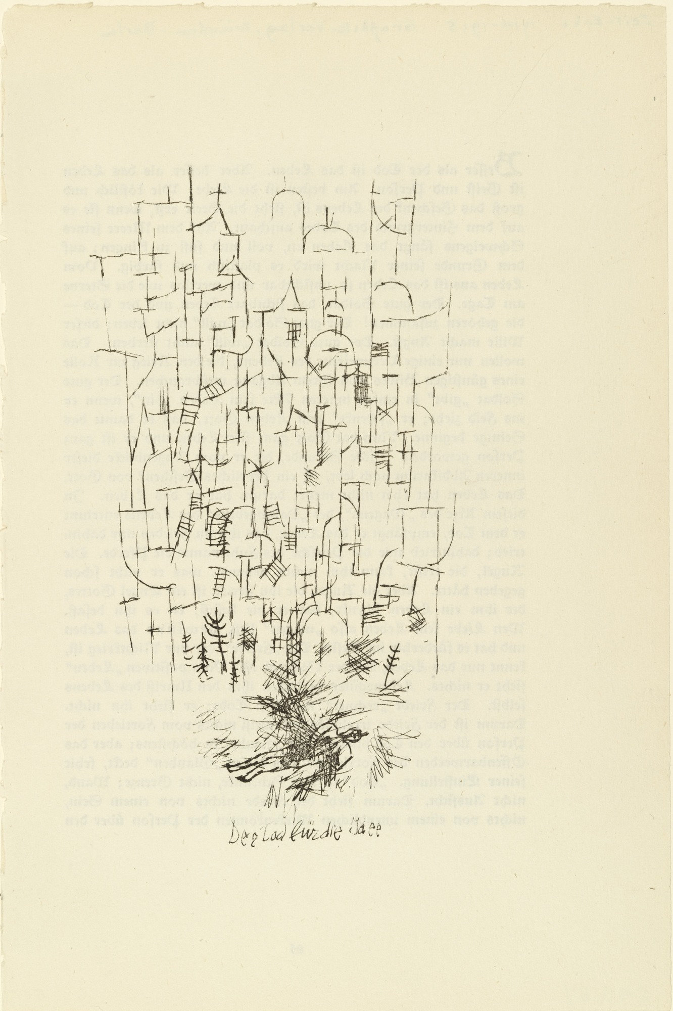 П. Клее. Смерть за идею. 1915. Литография. 15,6 х 8,6 см. Фонд Пауля Клее. Художественный музей, Берн